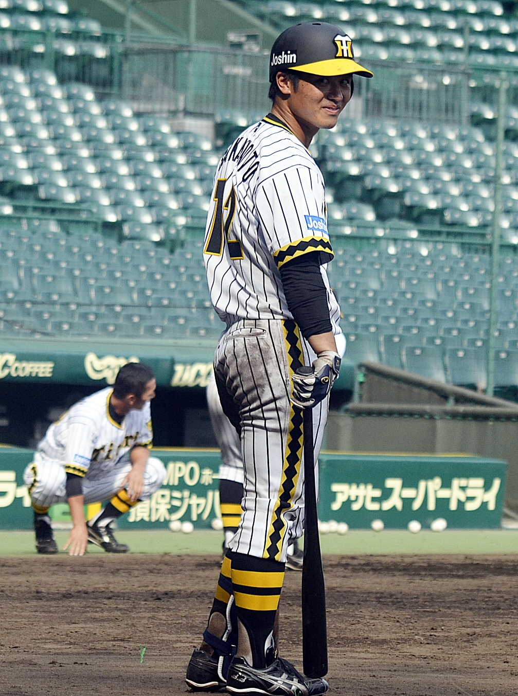 阪神タイガースの坂本誠志郎選手